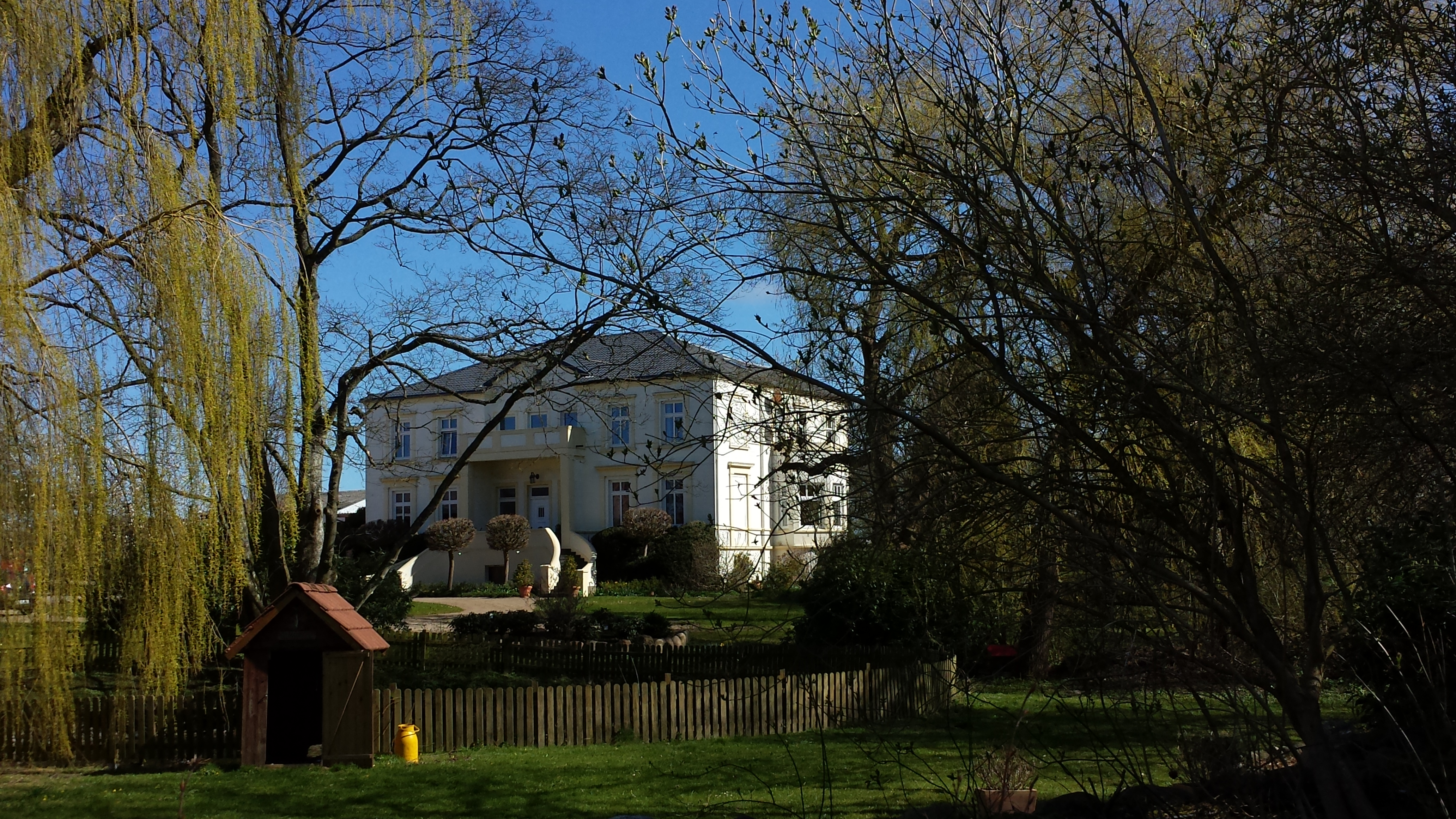 Malkwitz (Malente), Schleswig-Holstein, Deutschland, Gut Ingenhof